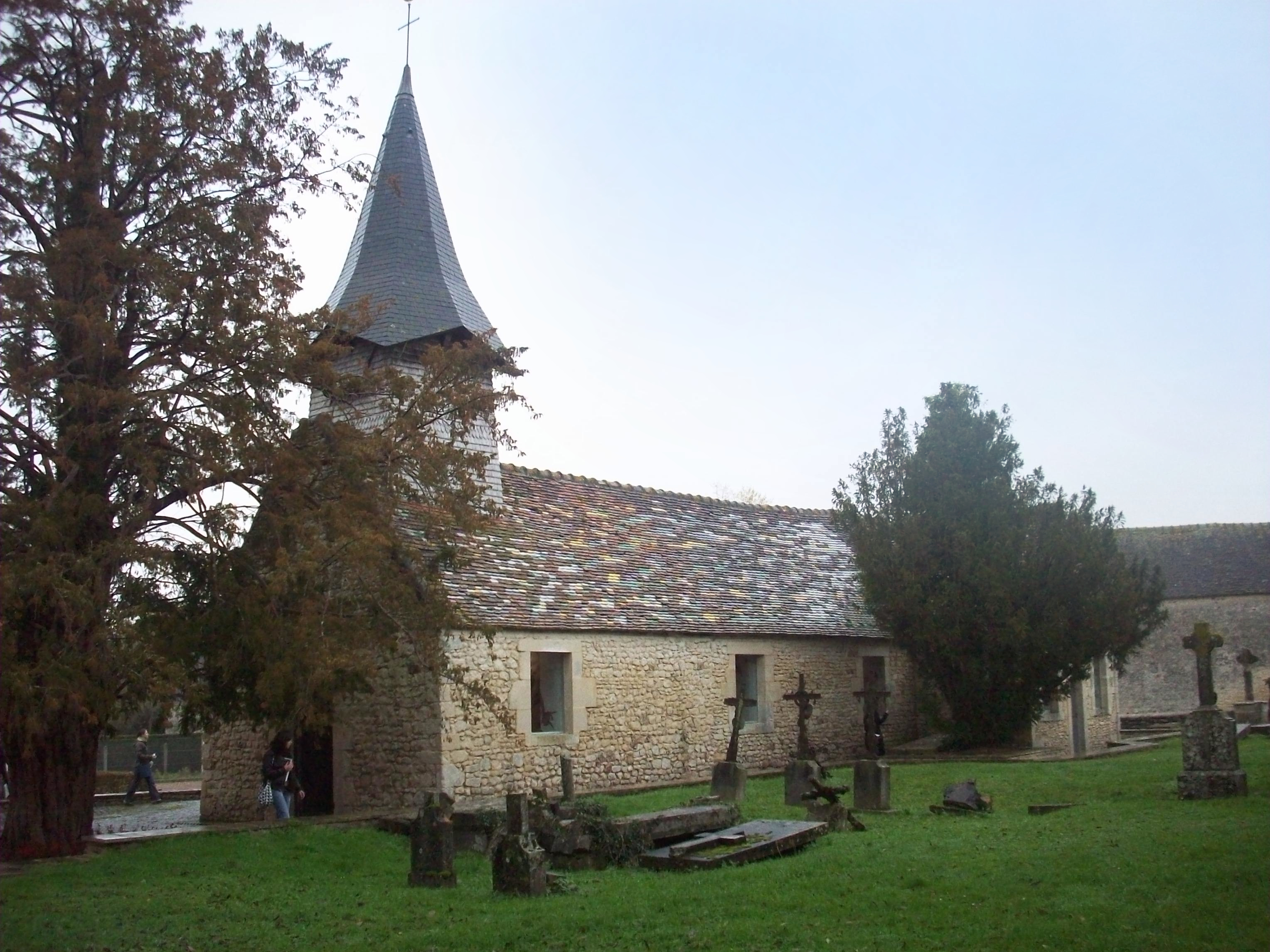 Chapelle Saint Vigor de Mieux